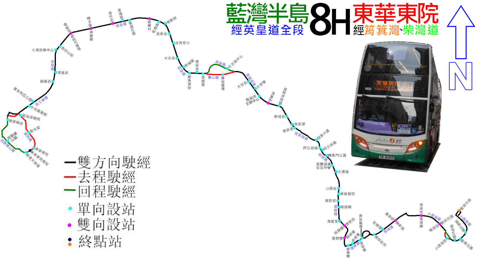 新巴8H線的走線圖